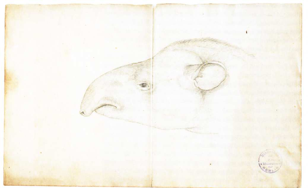 Friedrich Sellow Erkundung S. 94 undatiert wohl ein Flachlandtapir